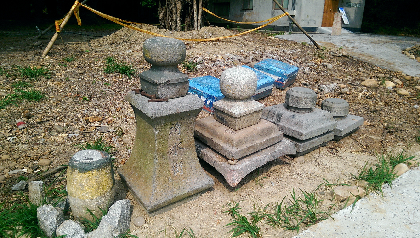 中文（台灣）: 清水神社石燈